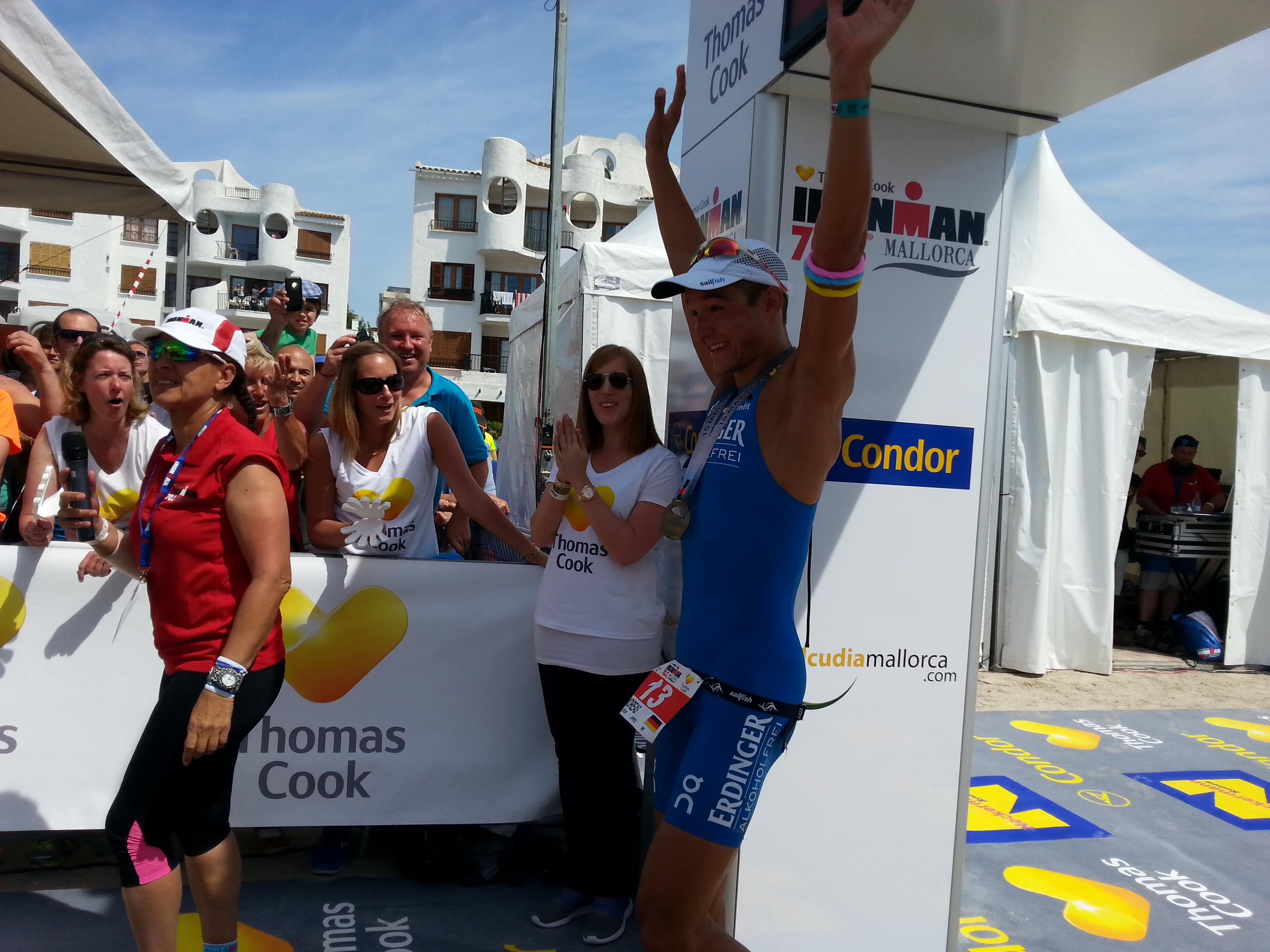 Andreas Dreitz Ironman 70.3 Alcudia Mallorca